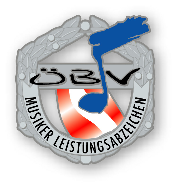 Musikerleistungsabzeichen in Silber